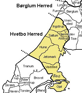 Hvetbo Herred, Hjørring Amt, Denmark Source: Map by Svend-Erik Christiansen